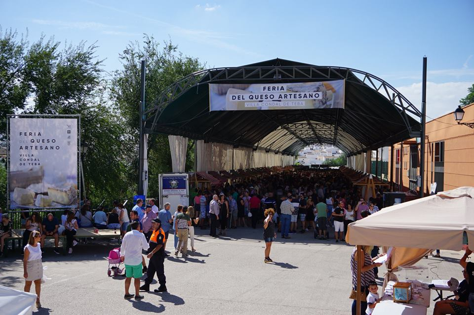 Autor de la Fotografía: Ayuntamiento de Teba